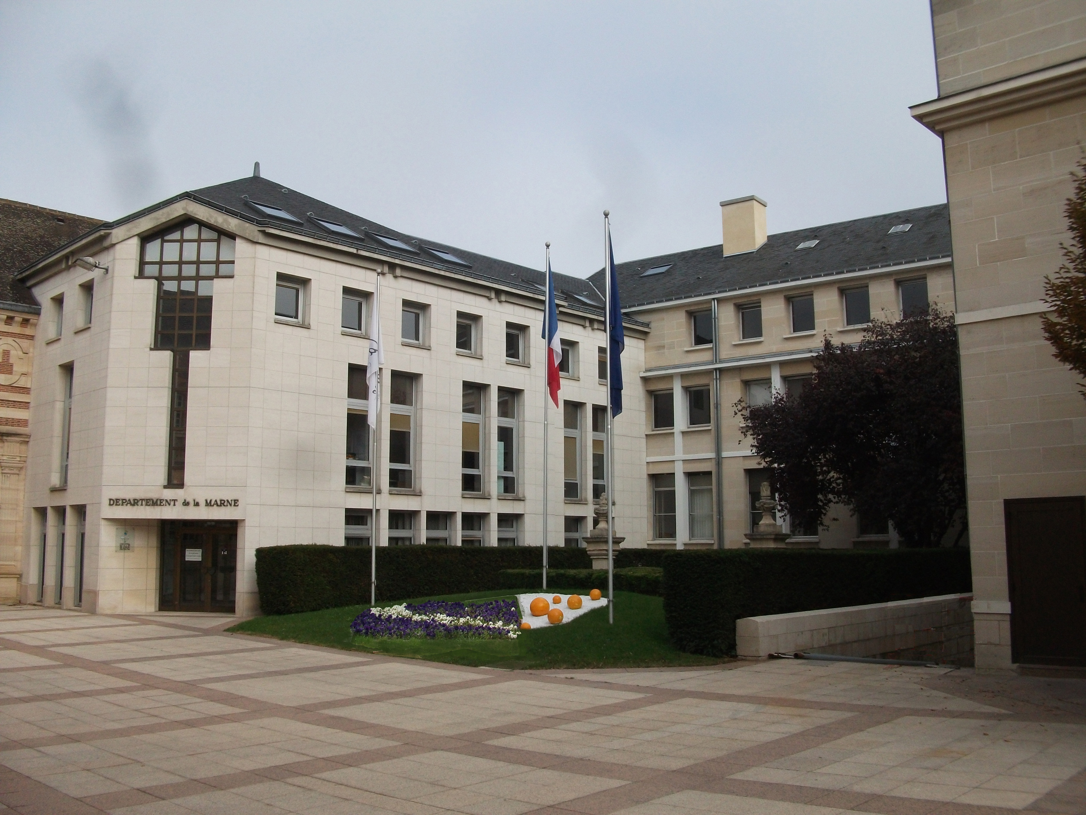 Couvent Sainte-Marie de Châlons-en-Champagne.